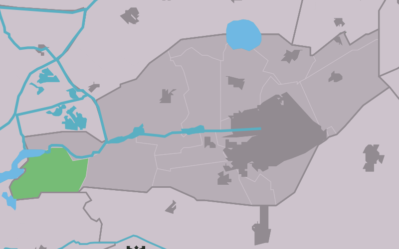 Kaartsje fan himrik fan Goaiïngahuzen